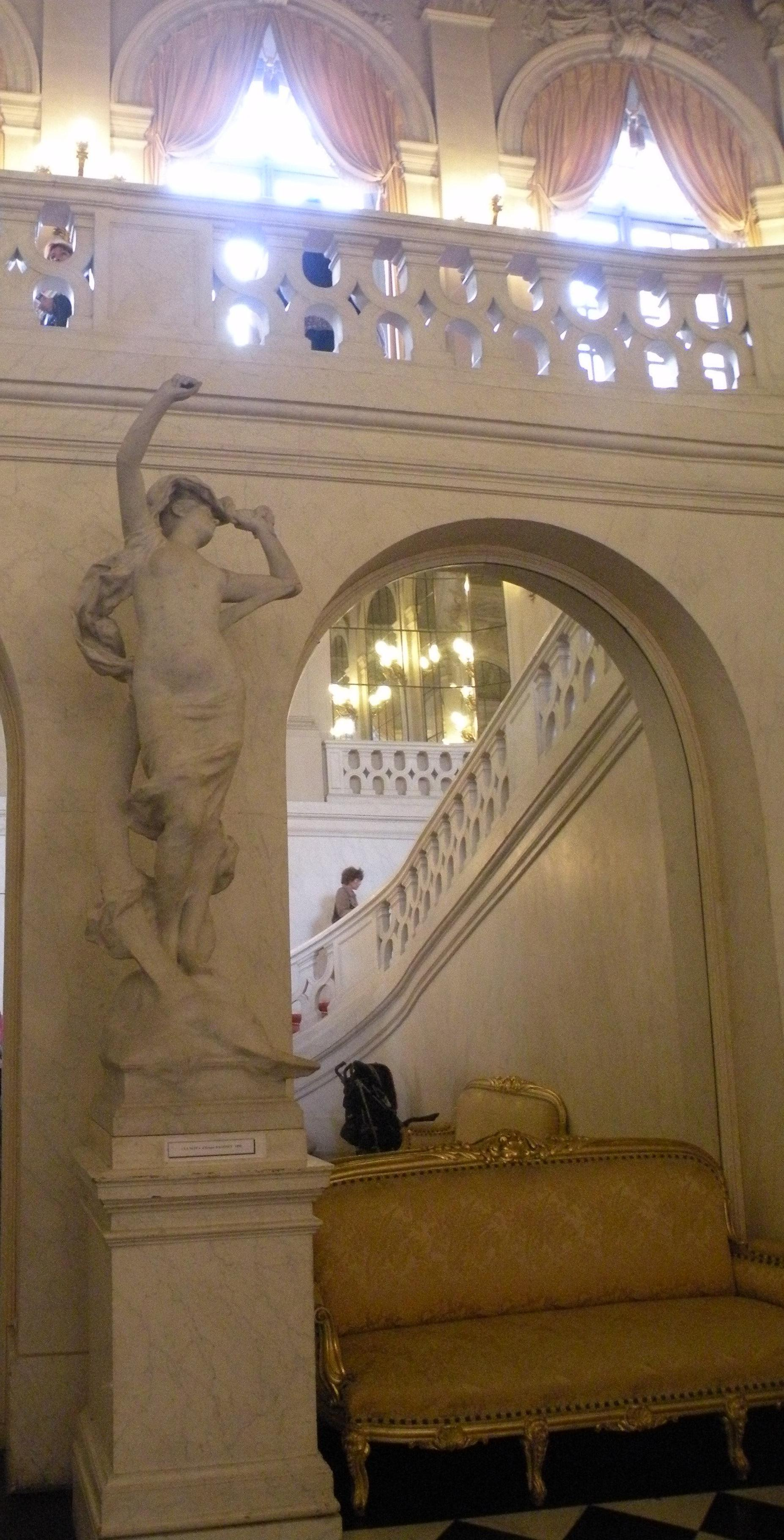 statue de la nuit de dagonet, 1878 au pied de l'escalier de boffrand Petit Luxembourg